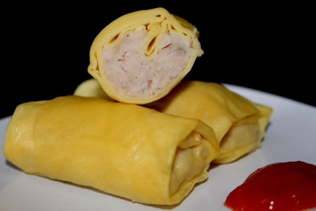 Sosis solo mbah kakoeng